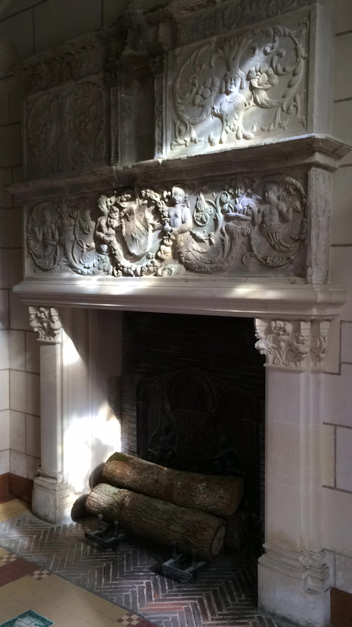 Fronton cheminée CG2